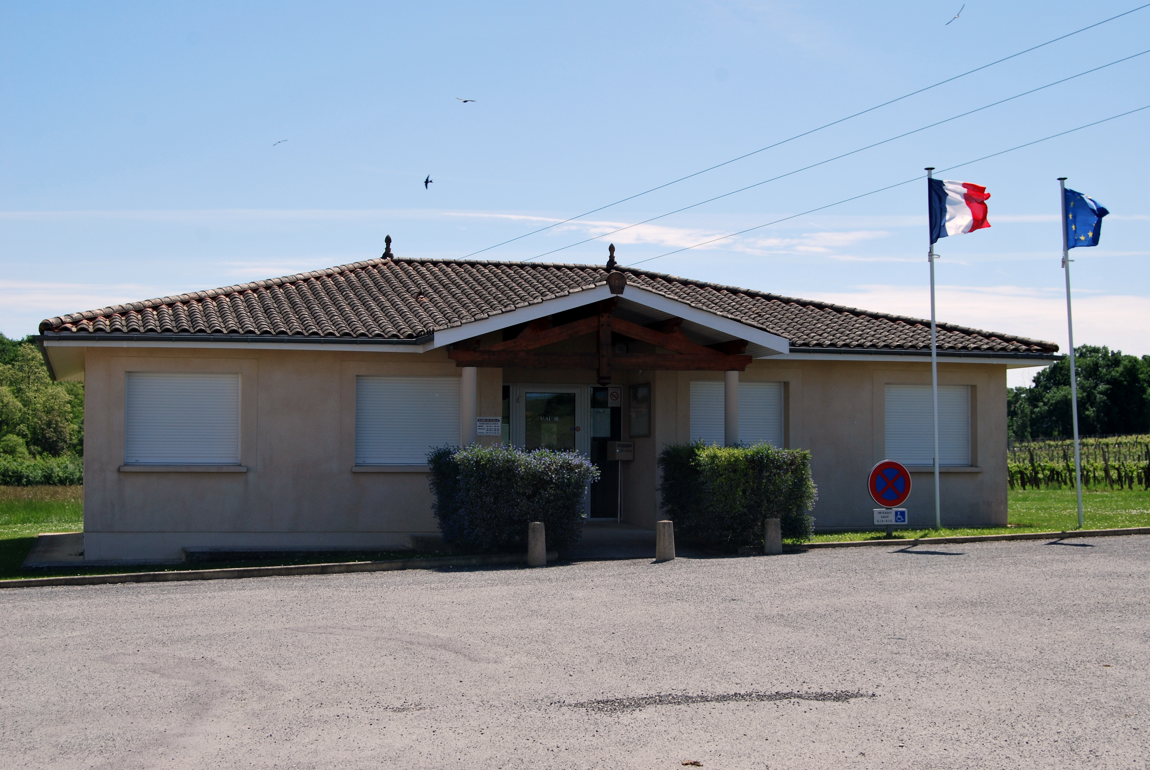 Guillac Mairie